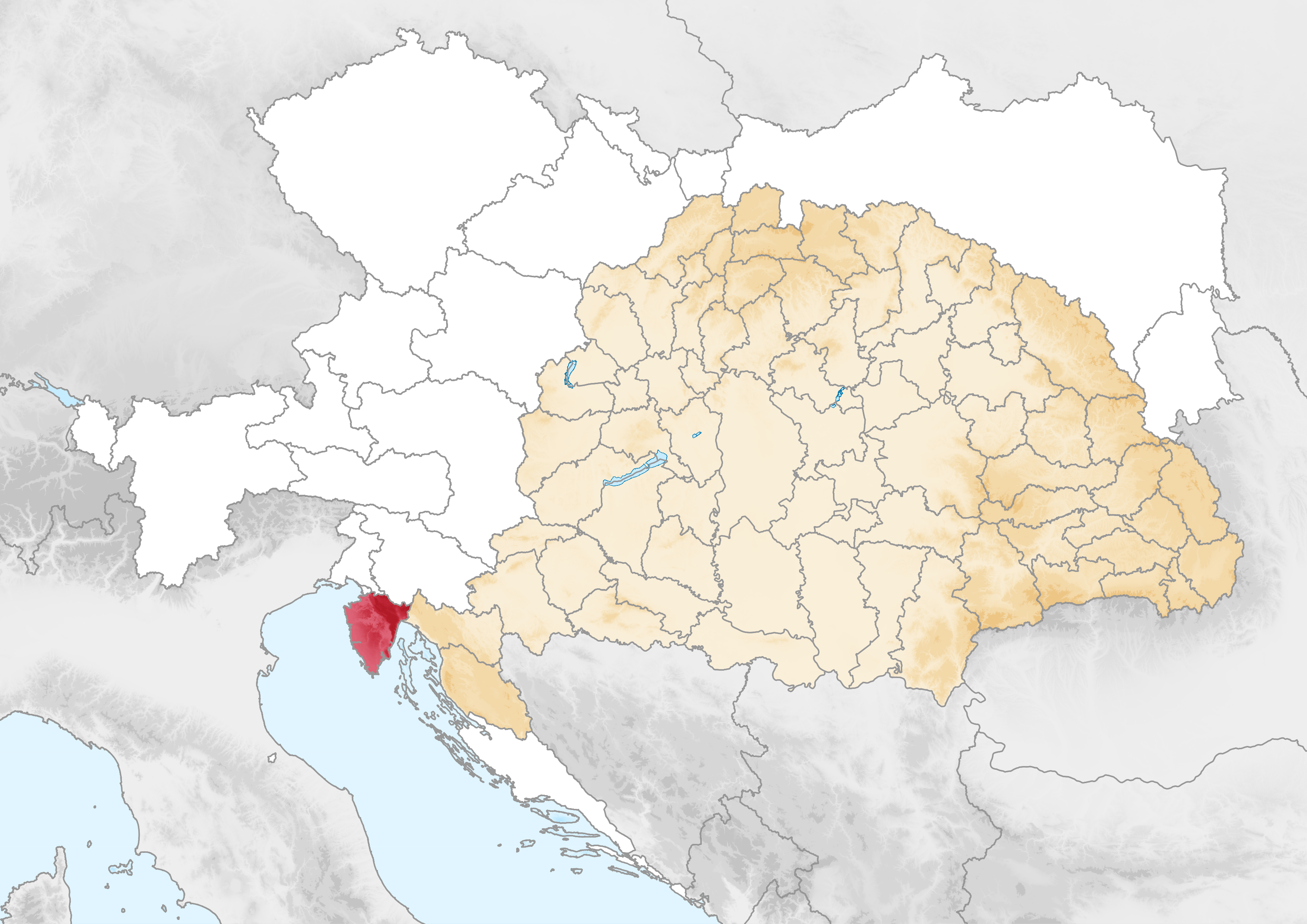 Carte de l'Istrie en 1914